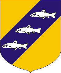 Maidla valla vapp